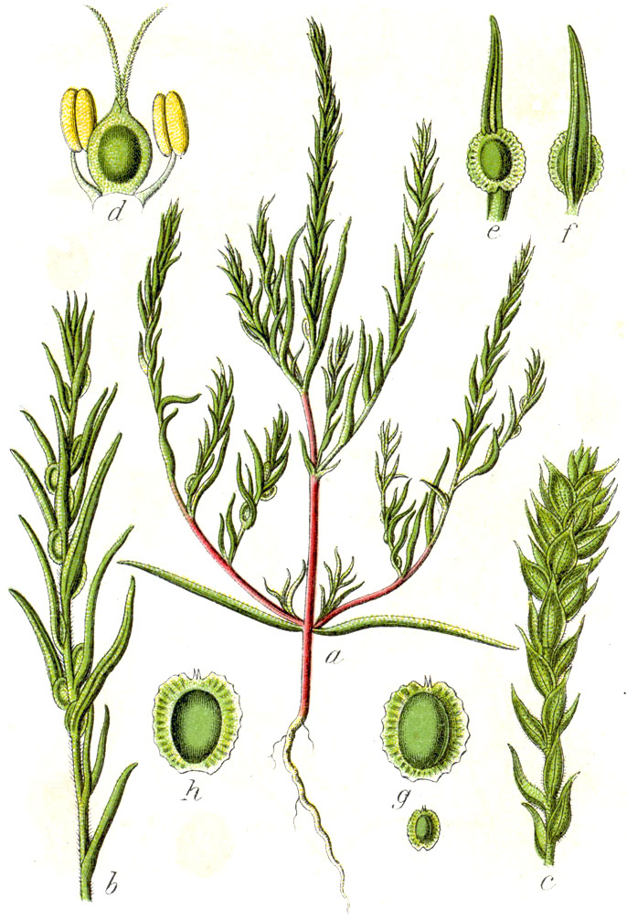 Corispermum marschallii Steven Original Caption Marschall-Wanzensame, Corispermum marschallii